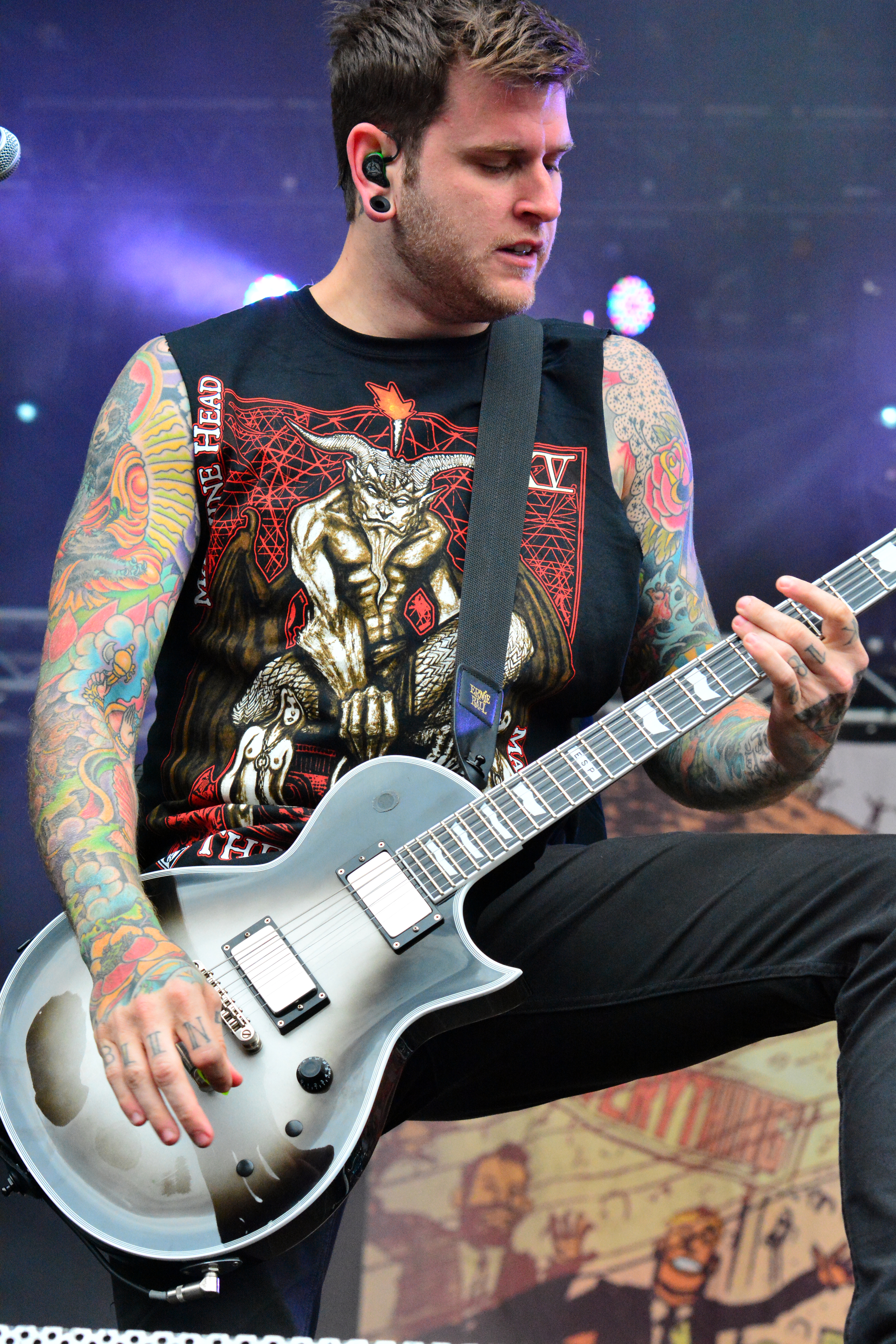 Neil Westfall von A Day to Remember beim Elbriot 2014